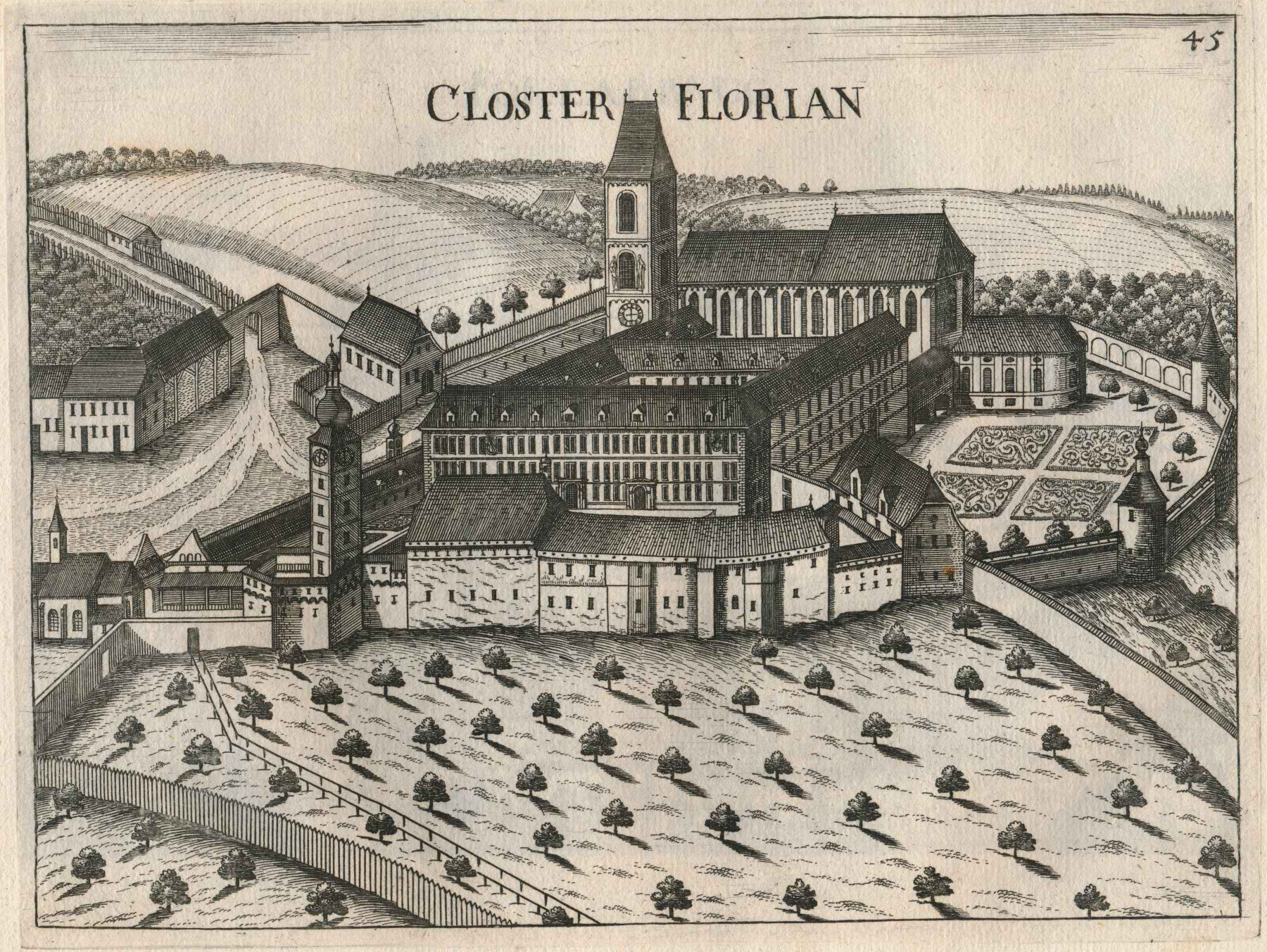 Das Stift Sankt Florian vor dem barocken Neubau. Kupferstich von Georg Matthäus Vischer